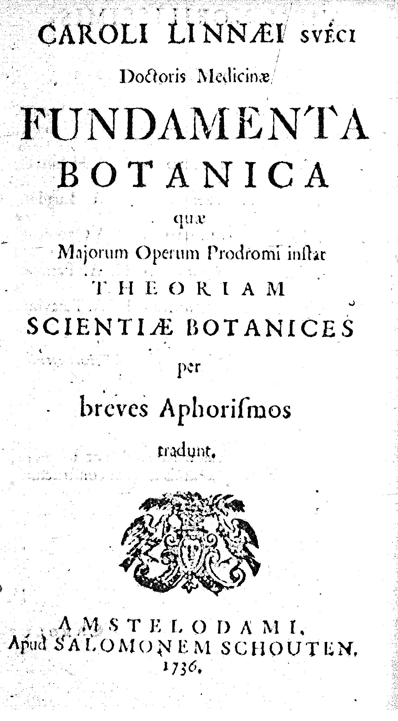 Titelblatt von Carl von Linnés Fundamenta Botanica, 1. Auflage, 1736